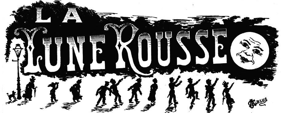 Dessin ornant le journal La Lune Rousse édité à Marseille.